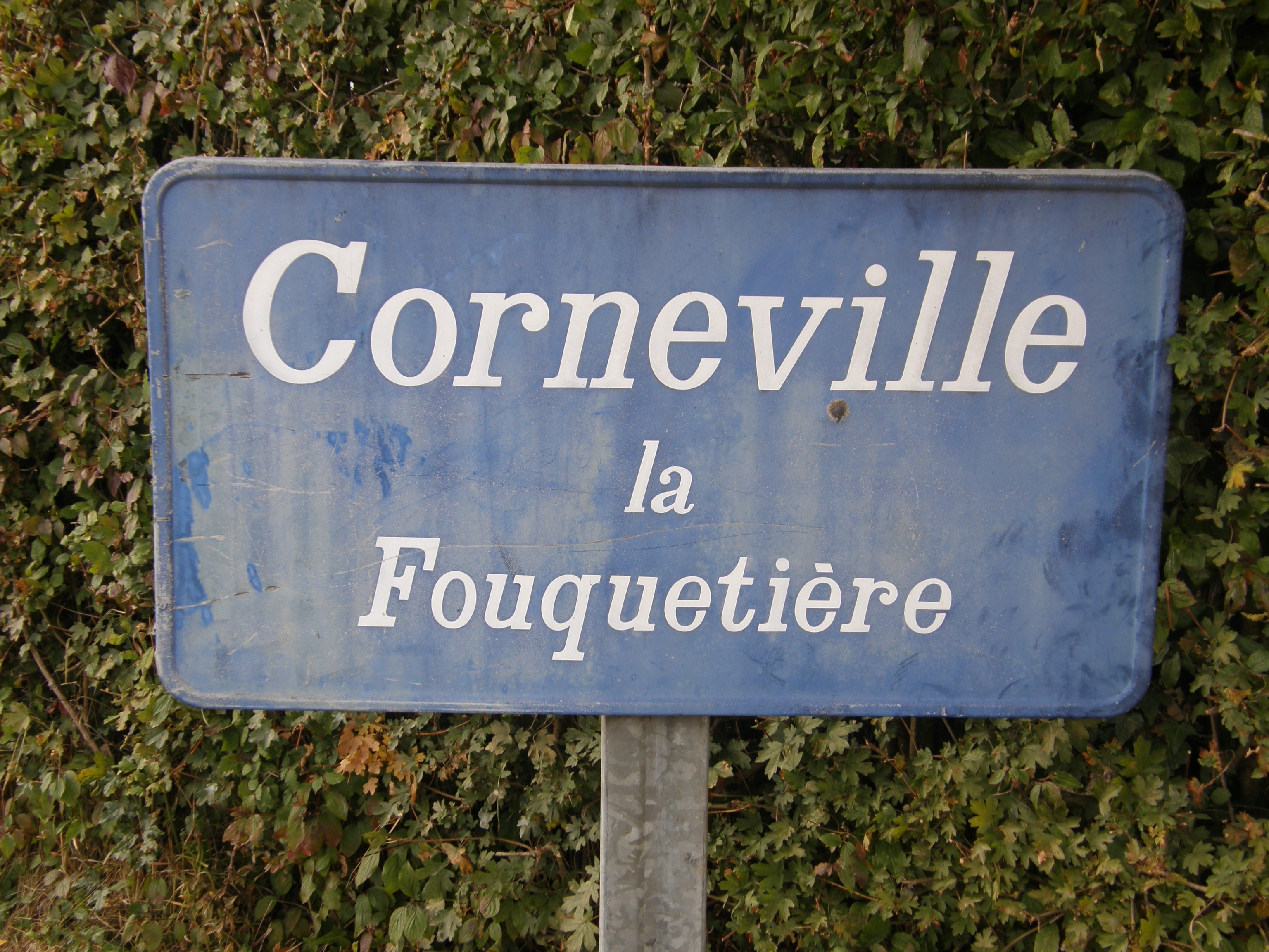 Panneau d'entrée dans Corneville la Fouquetière